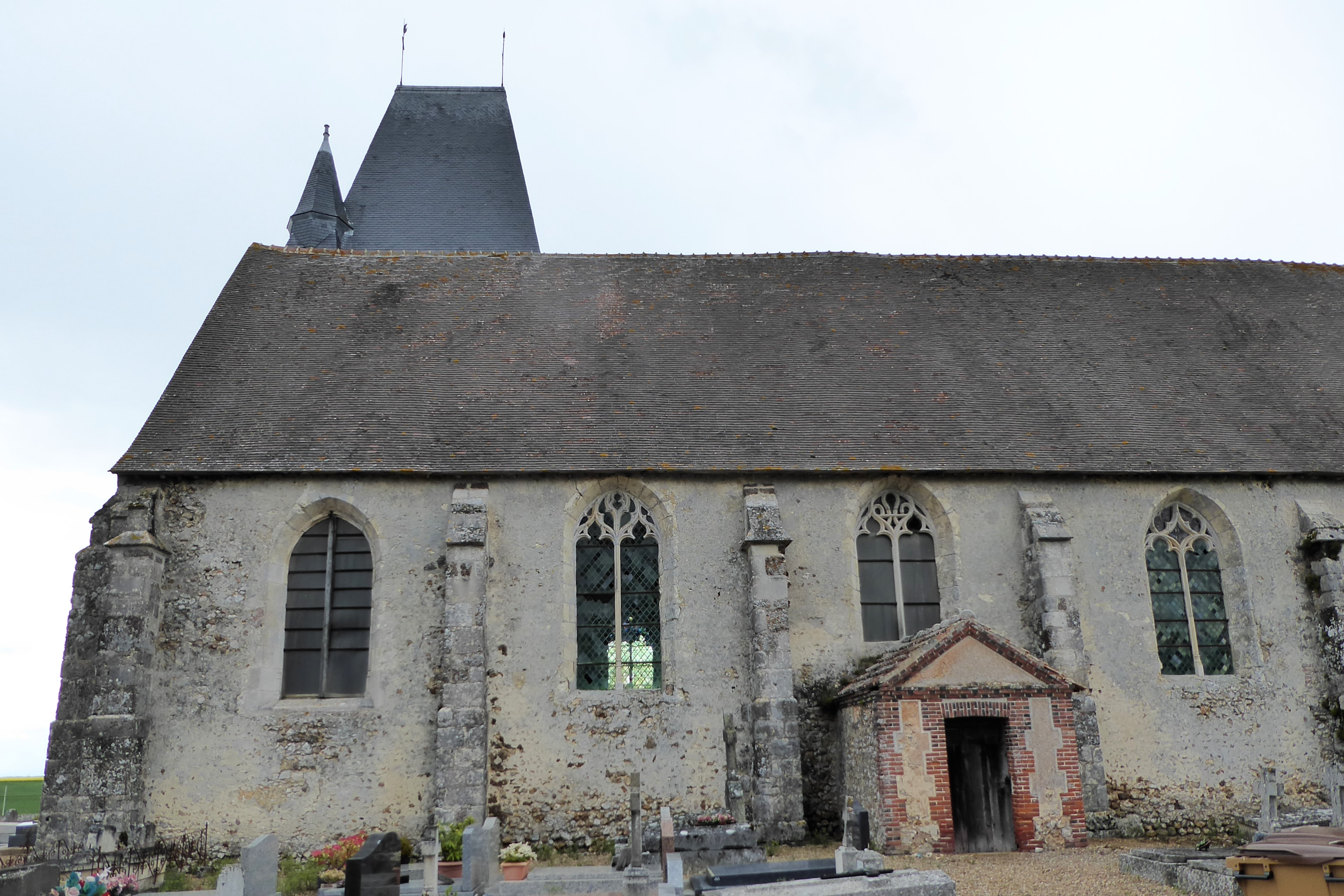 façade sud de l'église Saint-Blaise, Gâtelles, Thimert-Gâtelles, Eure-et-Loir, France.